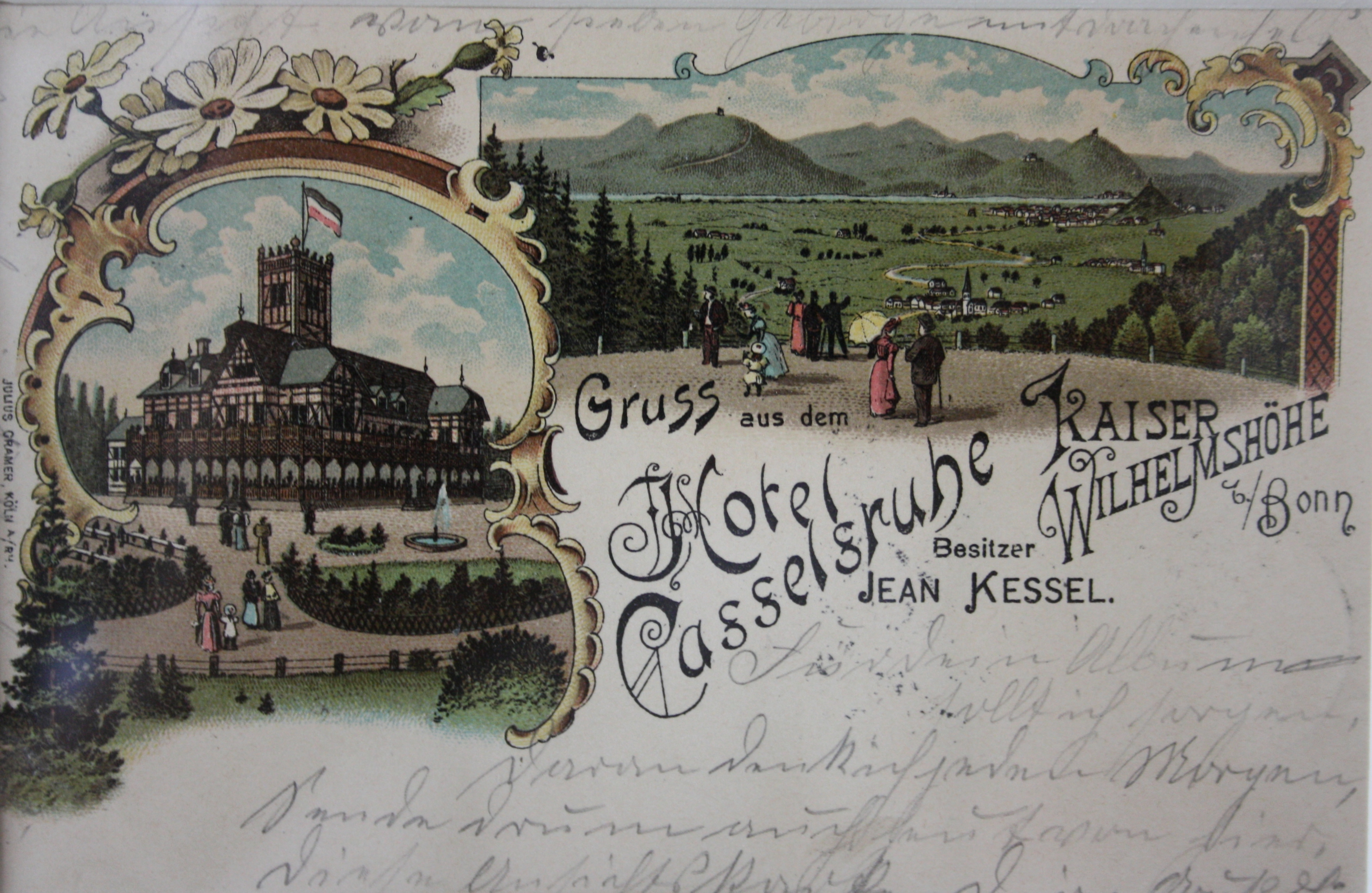 Aussenansicht des Hotel Casselsruhe und Blick von der Terrasse ins Bonner Rheintal (Gemälde), um 1900